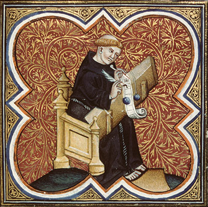 Bibliothèque de Besançon, manuscrit 434, folio 1. Miniature en tête du texte "Recueil de textes politiques et moraux à l'usage des princes" représentant l'auteur du traité Guillaume Peyraut écrivant. Ce manuscrit réalisé à Paris en 1372 à la demande du roi Charles V est conservé à la "librairie" (bibliothèque) du Louvre jusqu'en 1413 au moins. Il entre dans les collections Granvelle, sans doute au XVIe siècle et apparaît dans l'inventaire de 1607 à Besançon. Source : La bibliothèque des Granvelle : reliures et manuscrits, 2014, page 40.